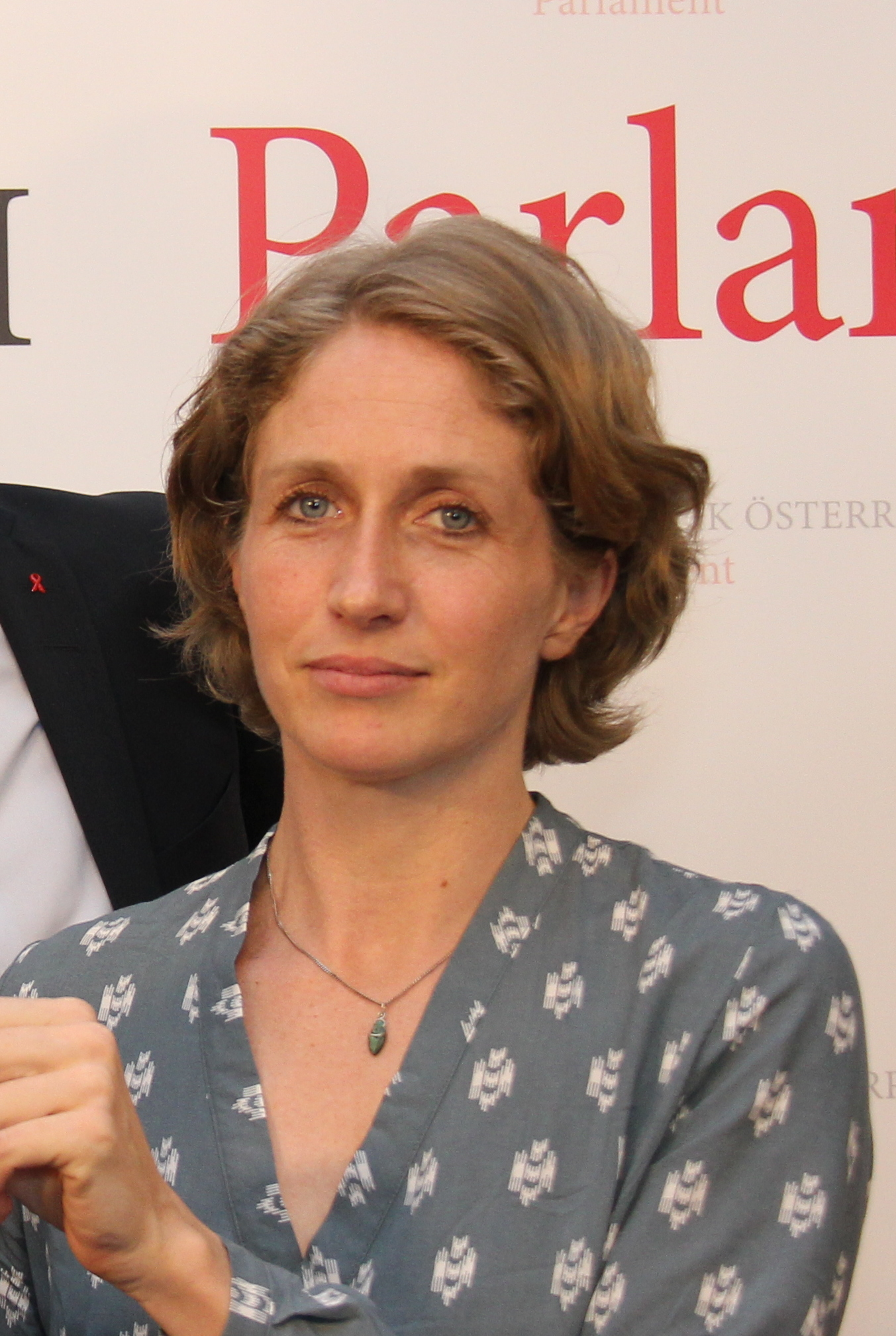 Präsentation Antrag U-Ausschuss Krainer mit NEOS und Liste Pilz